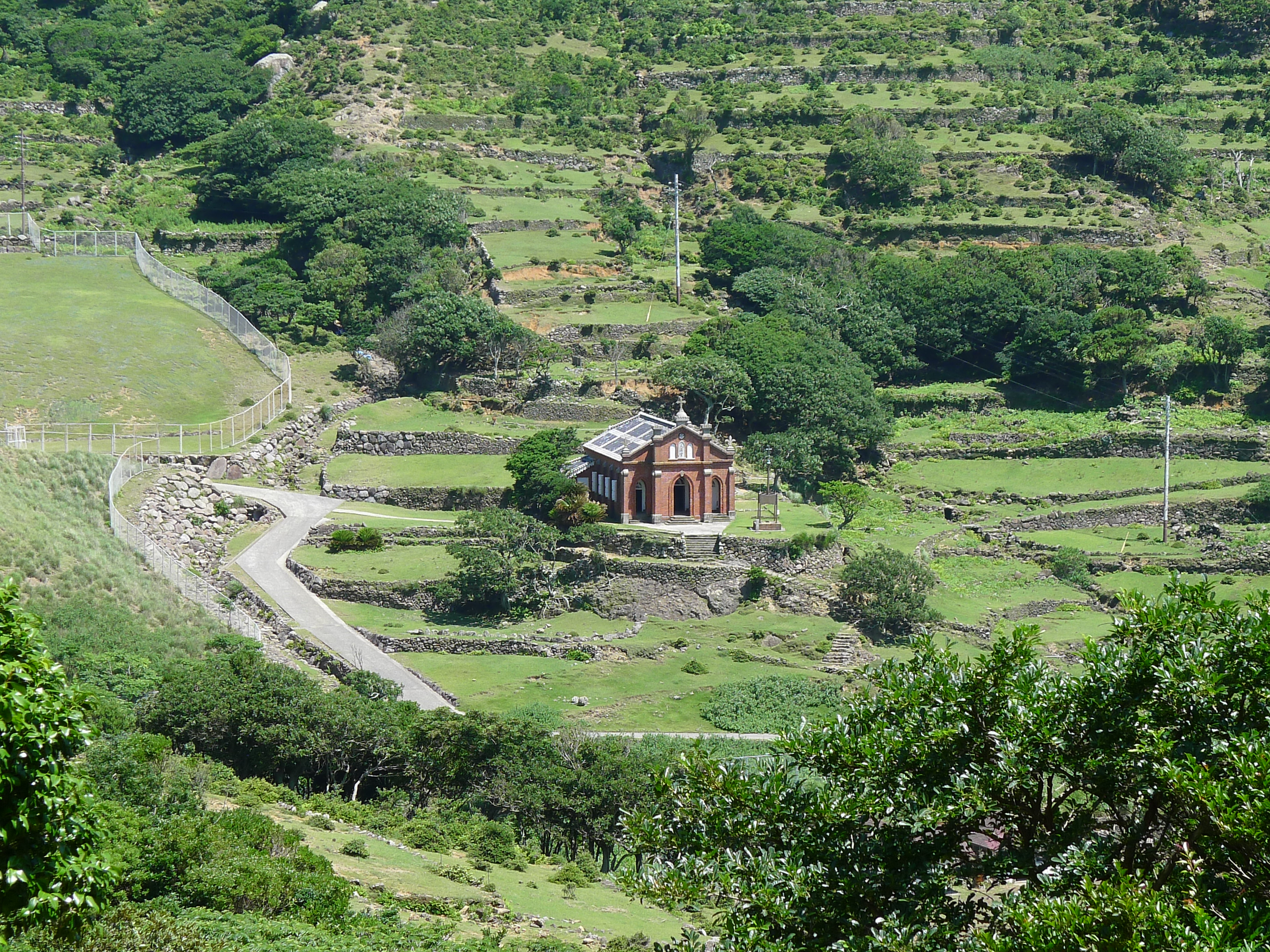 野崎島の旧野首教会と旧野首集落跡の石積みtitle error：Nokubi Church